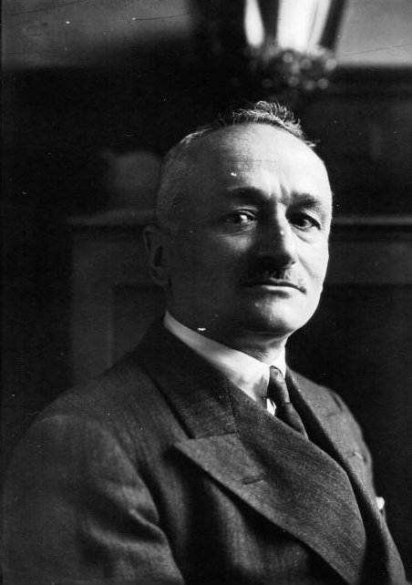 Edmond Gentil directeur de la Maison Alcyon